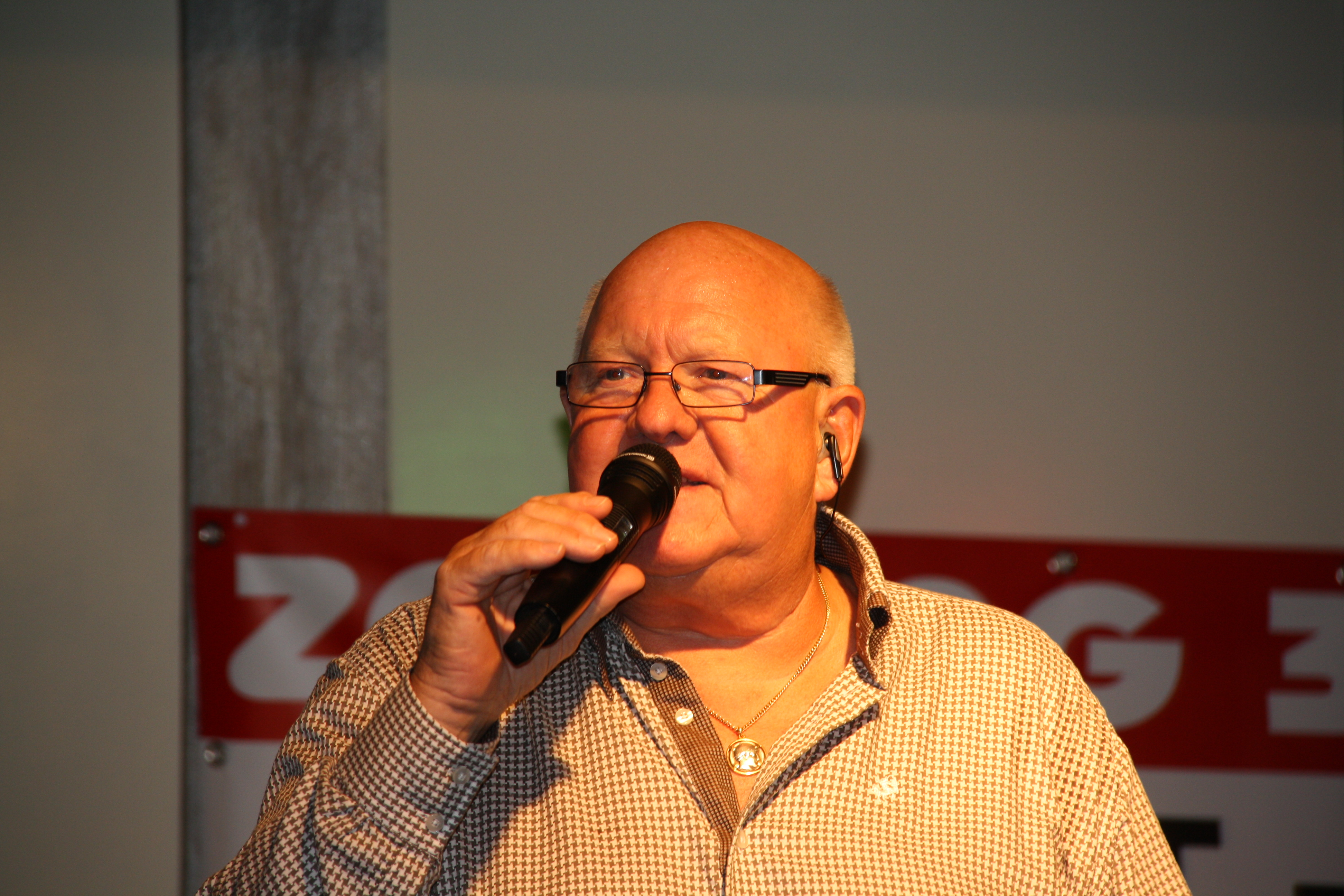 Henk Wijngaard op zijn gezamenlijke vriendenfanclubdag met Silvia Swart.